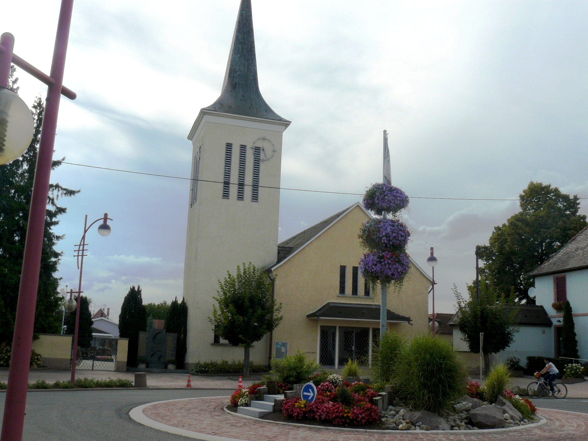 Temple luthérien